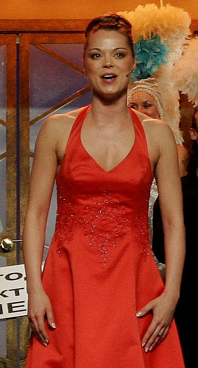 Церемония вручения Национальной премии "Музыкальное сердце театра". 1 марта 2007 г. в Доме музыки